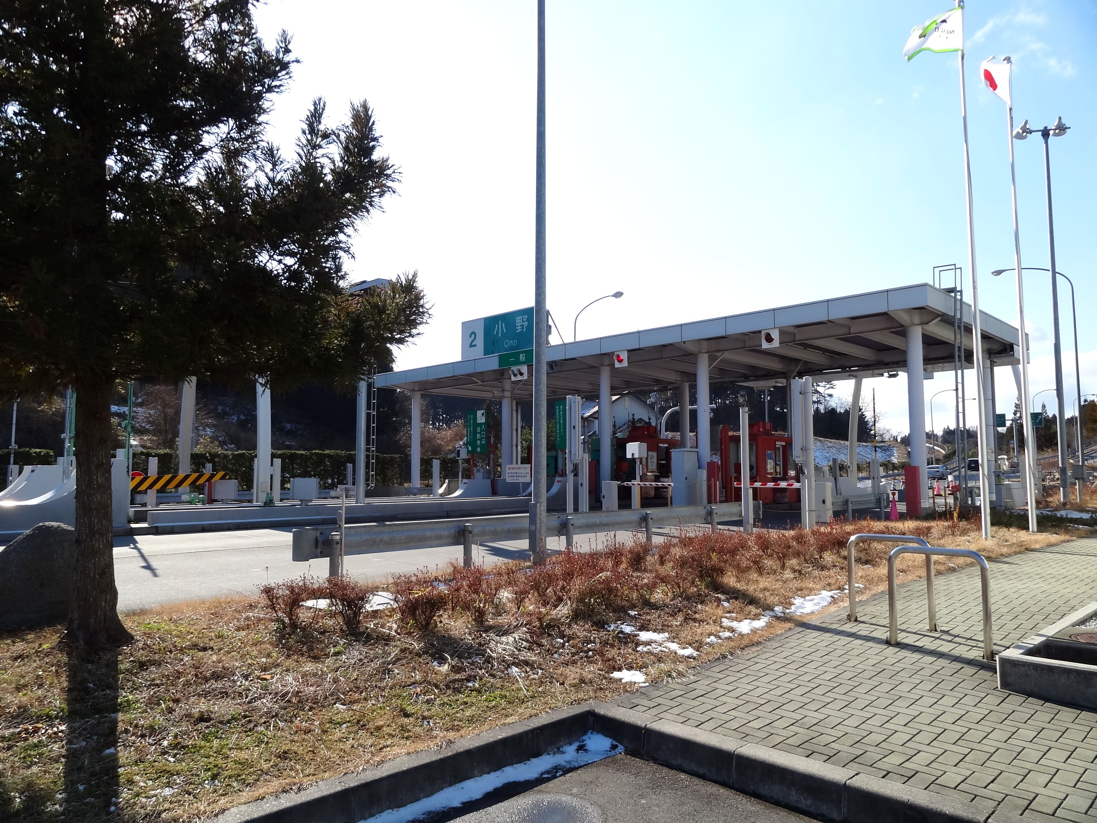 磐越自動車道 小野インターチェンジ